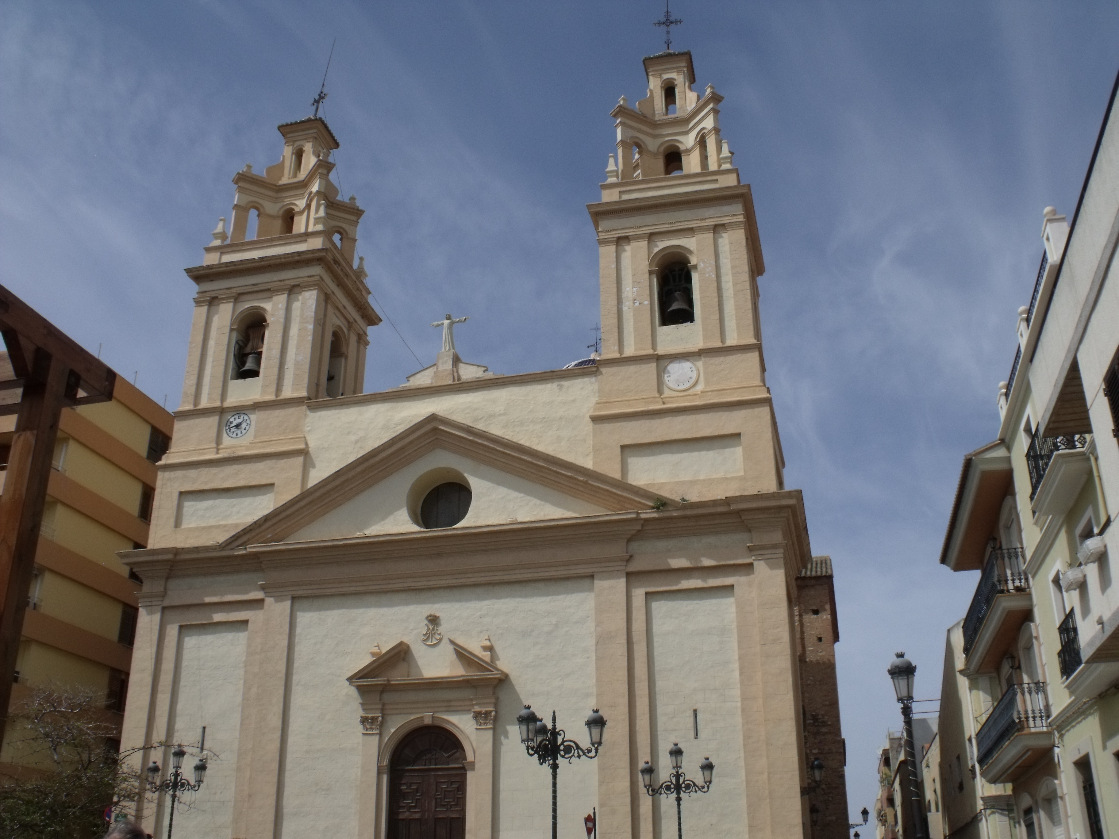 Iglesia parroquial de la Asunción de Ribarroja.